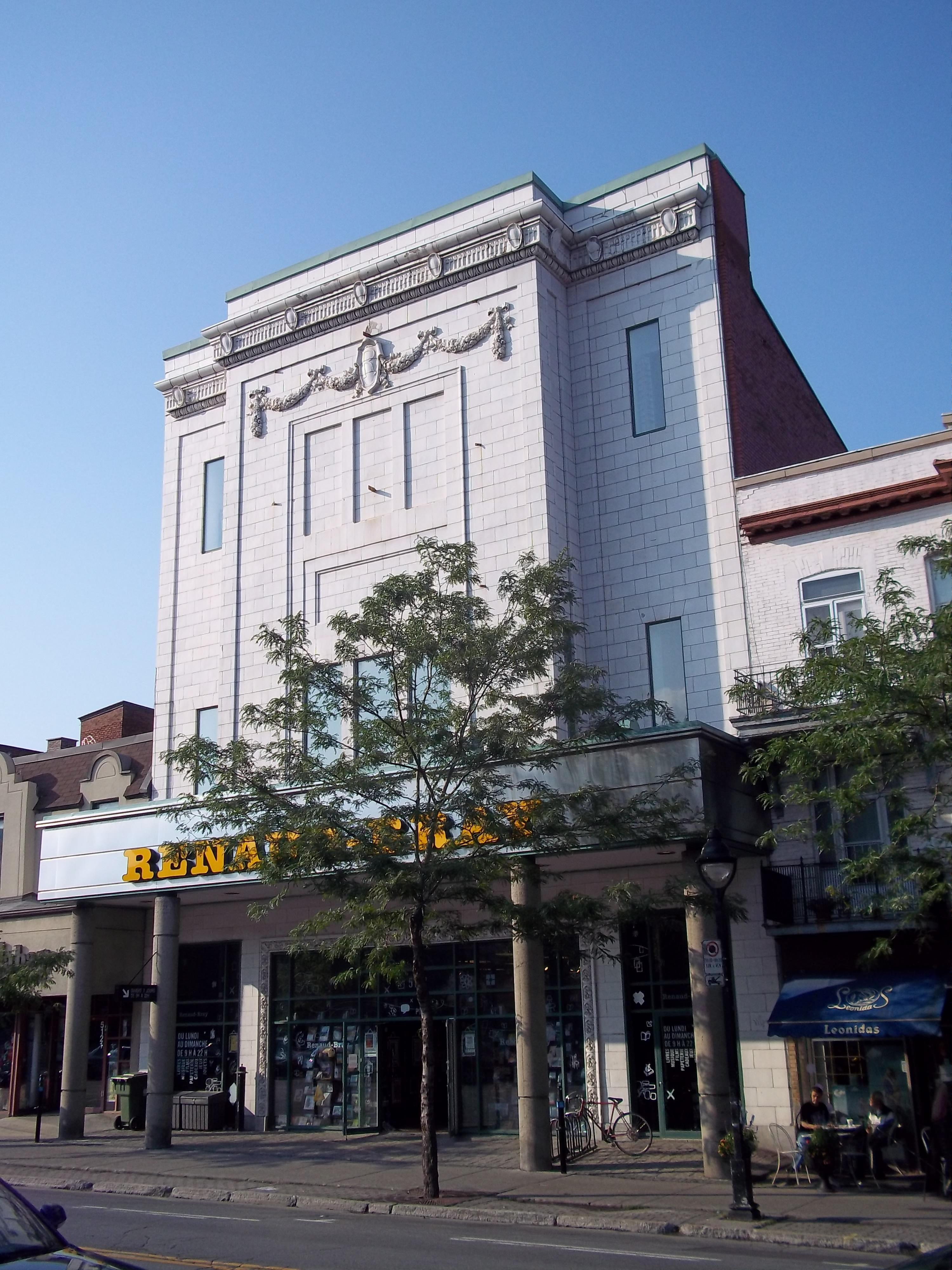 Regent Theatre (Librairie Renaud-Bray) 5117 avenue du Parc, Montréal